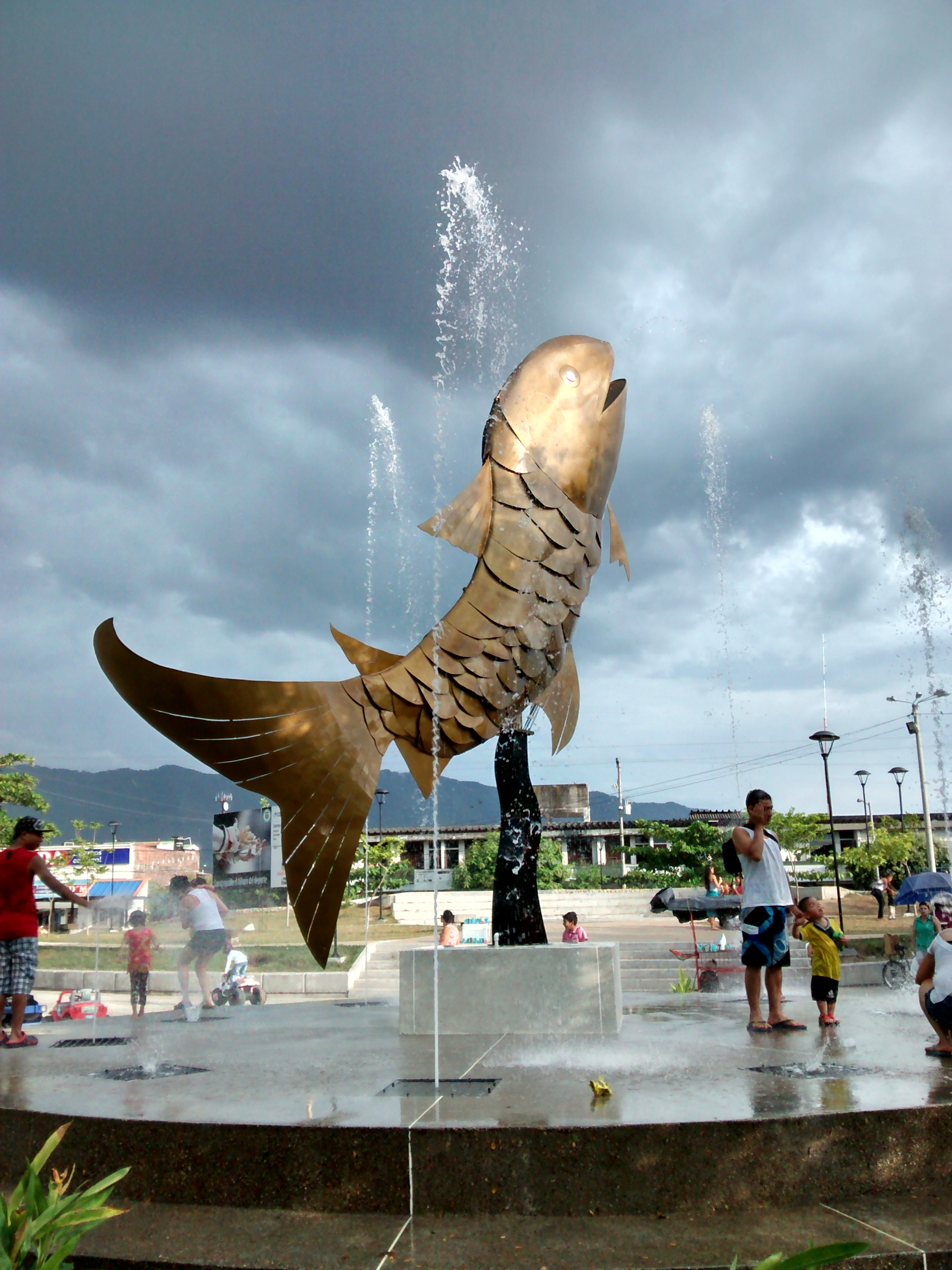 Parque Santander - La Dorada Caldas